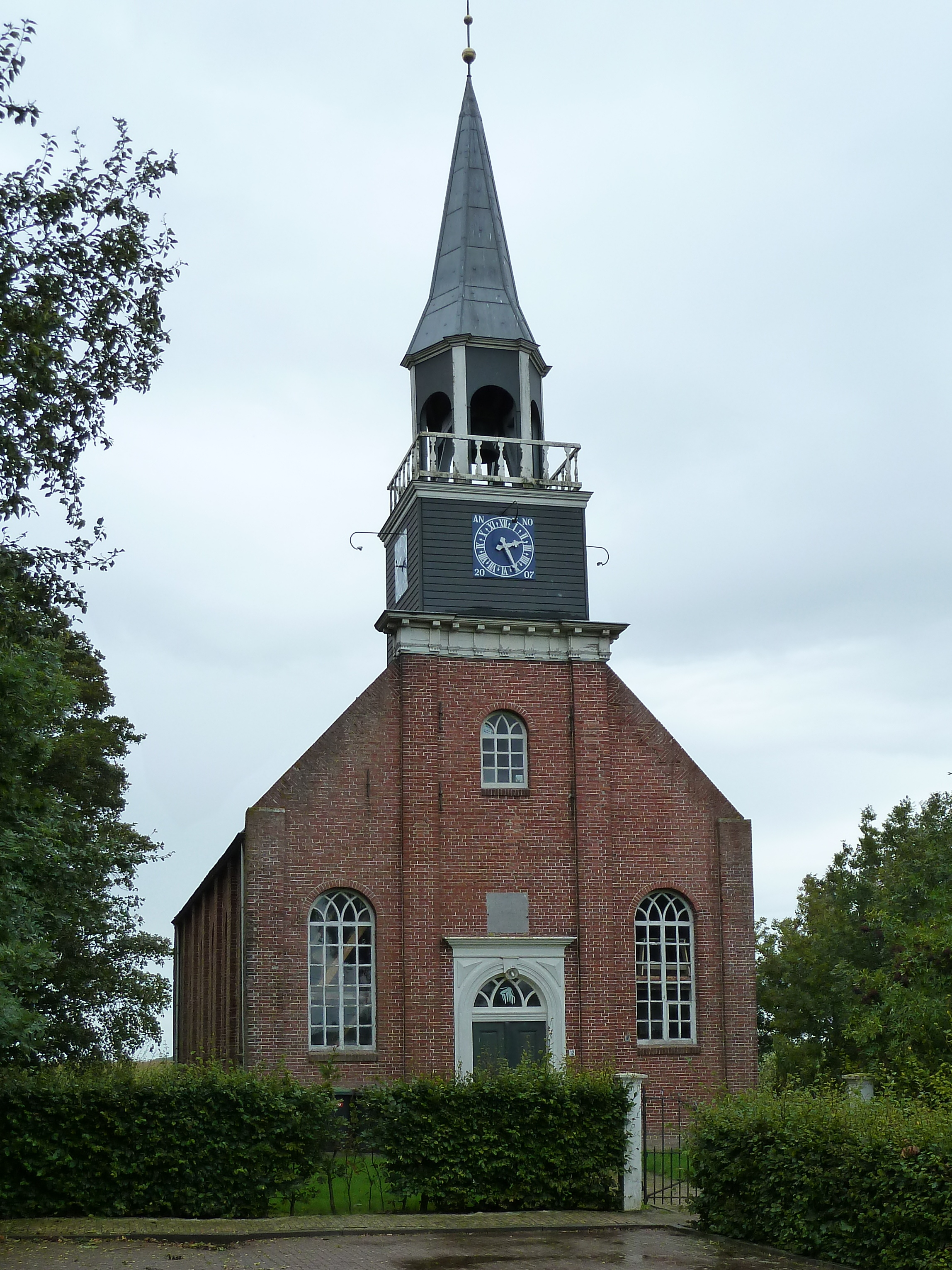 Klein Wetsinge, zaalkerk (volgens gevelsteen uit 1840), vooraanzicht. Vervangende kerk voor kerk van Groot Wetsinge. Rijksmonument.